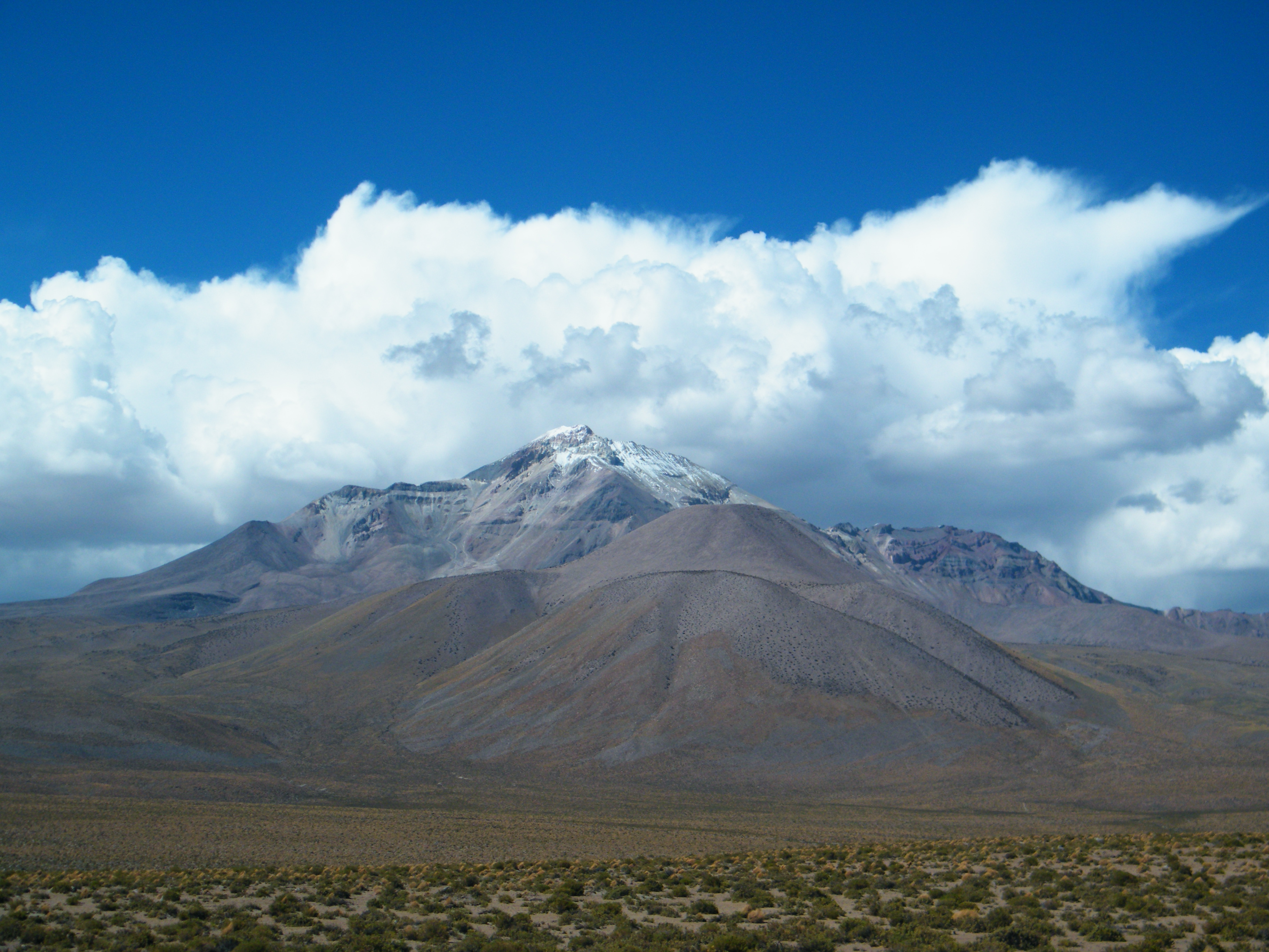 Volcan Isluga